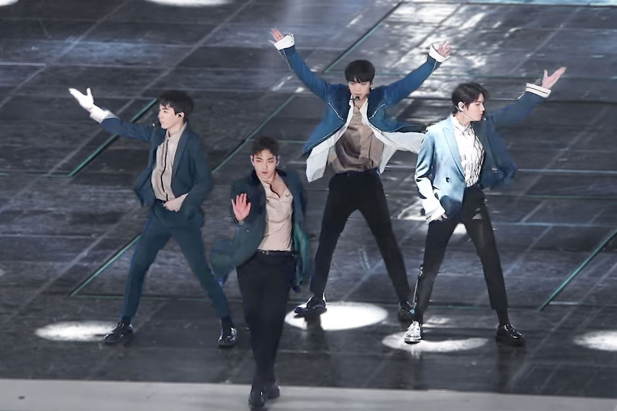 171022 부산 원아페 Where You At